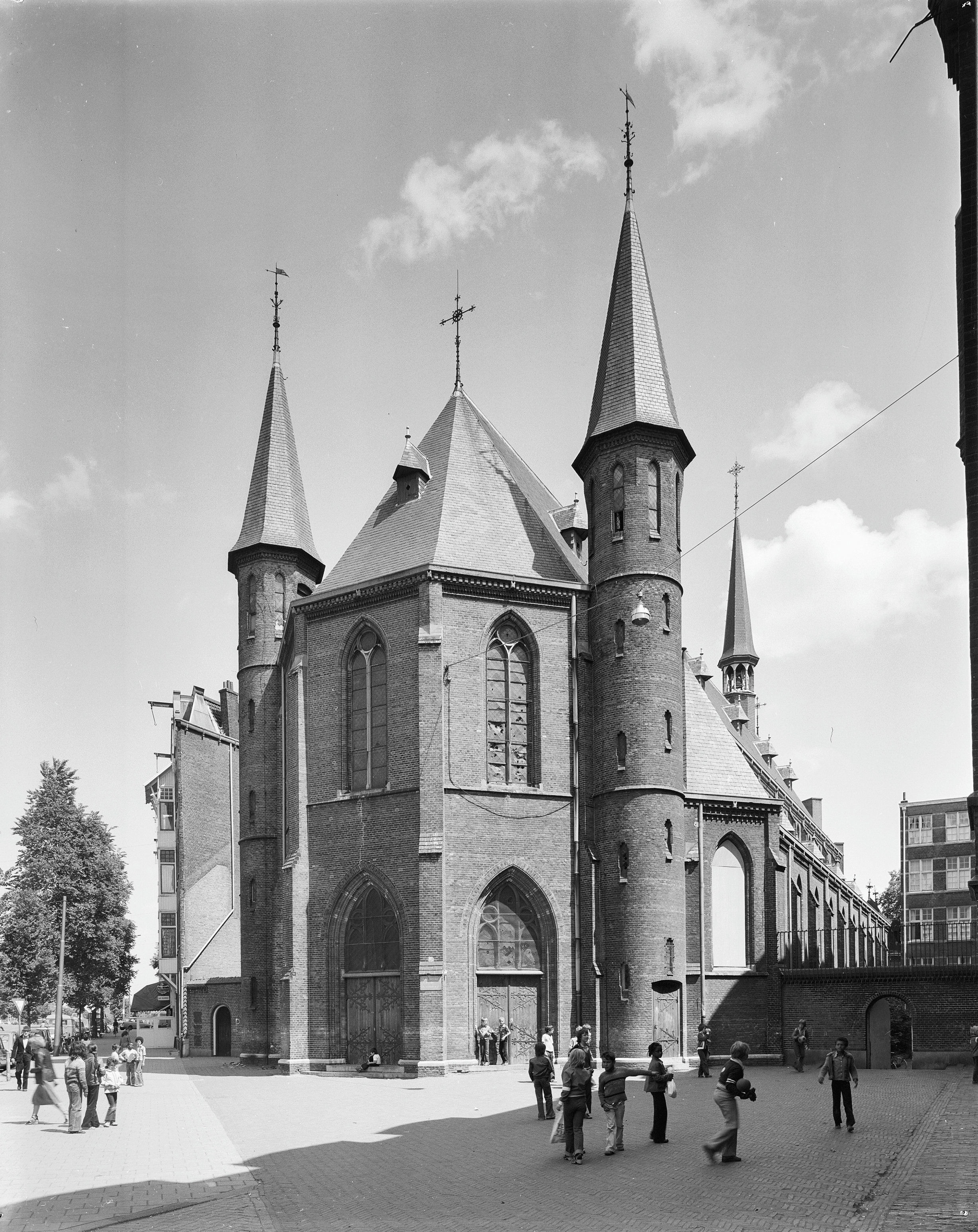 R.K.Kerk "De Liefde"/ St.Nicolaas- en Barbarakerk: zuid-west gevel